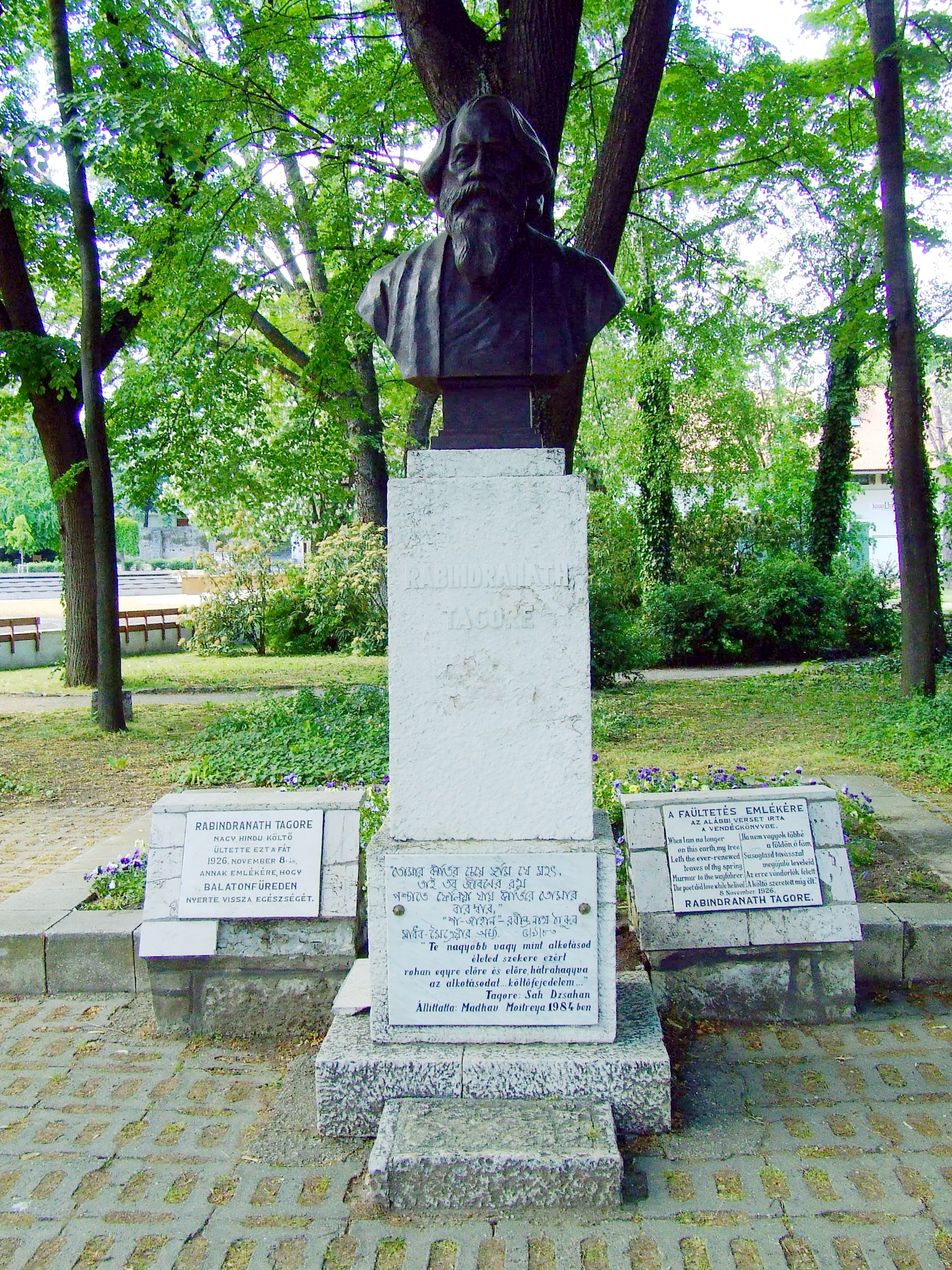 Rabindranath Tagore szobra Balatonfüreden. Az indiai kormány ajándéka, Shri Gautam Pal alkotása (2005) (Az eredetileg itt álló szobrot, Rasithan Kashar alkotását 1956-ban avatták, ma a szívkórház Tagore-emlékszobájában található)